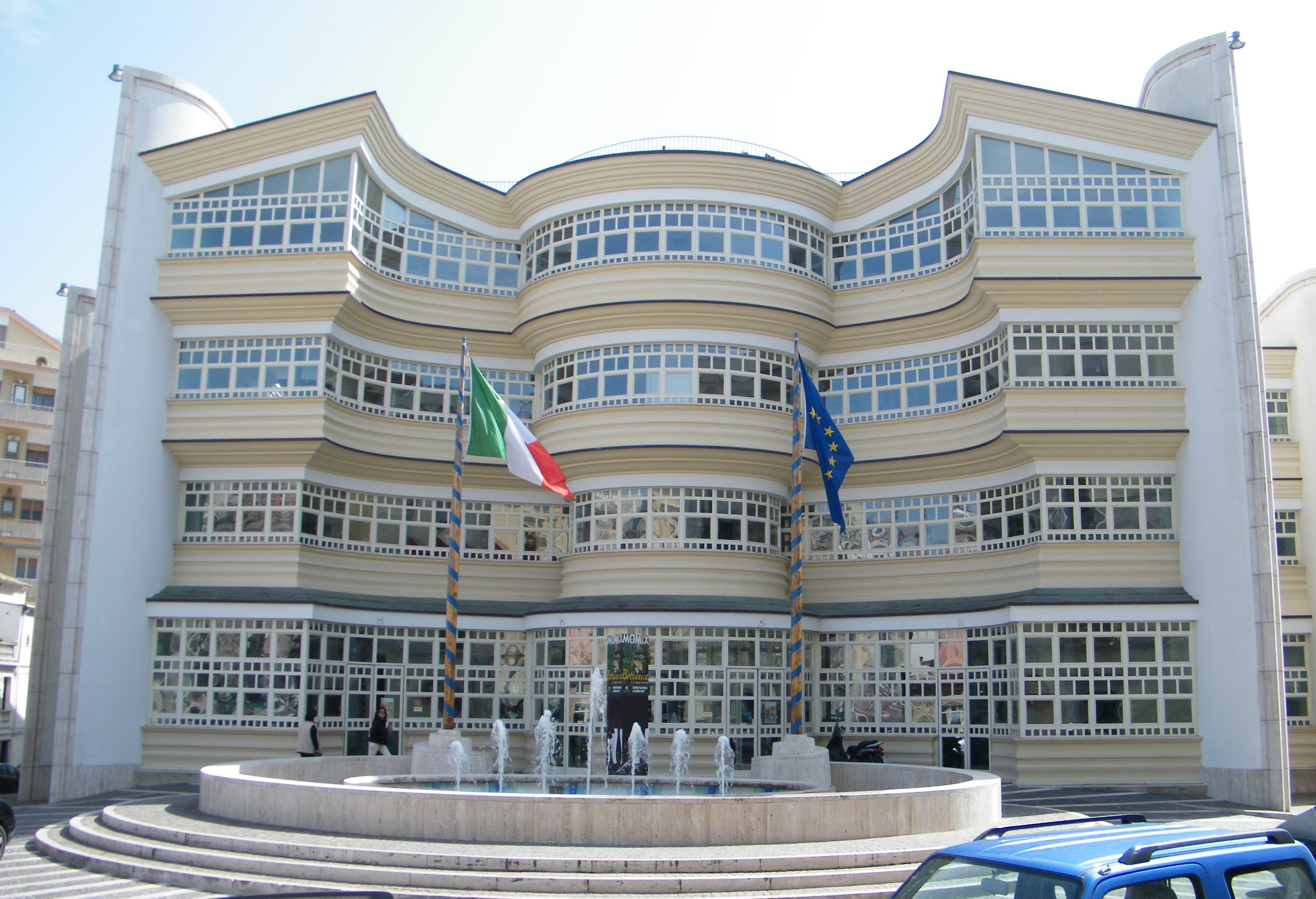 Catanzaro, nuovo teatro Politeama